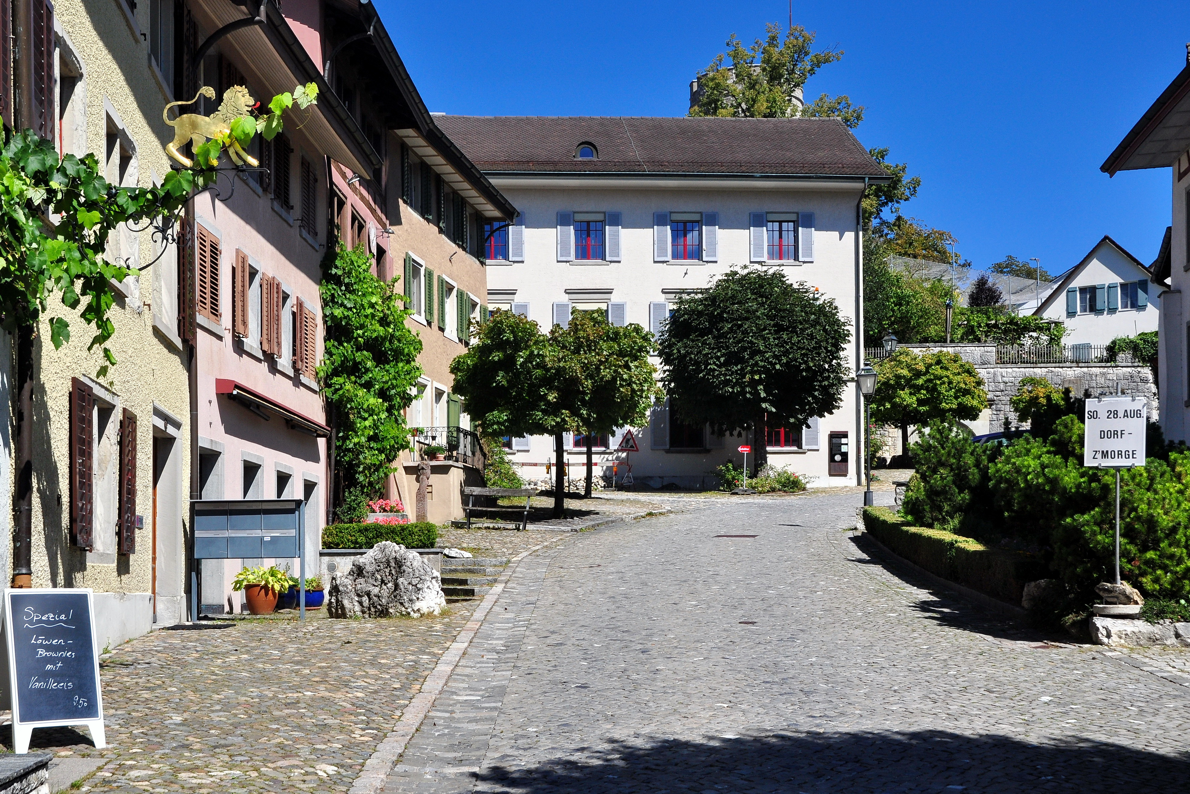 Unterburg in Regensberg (Switzerland)